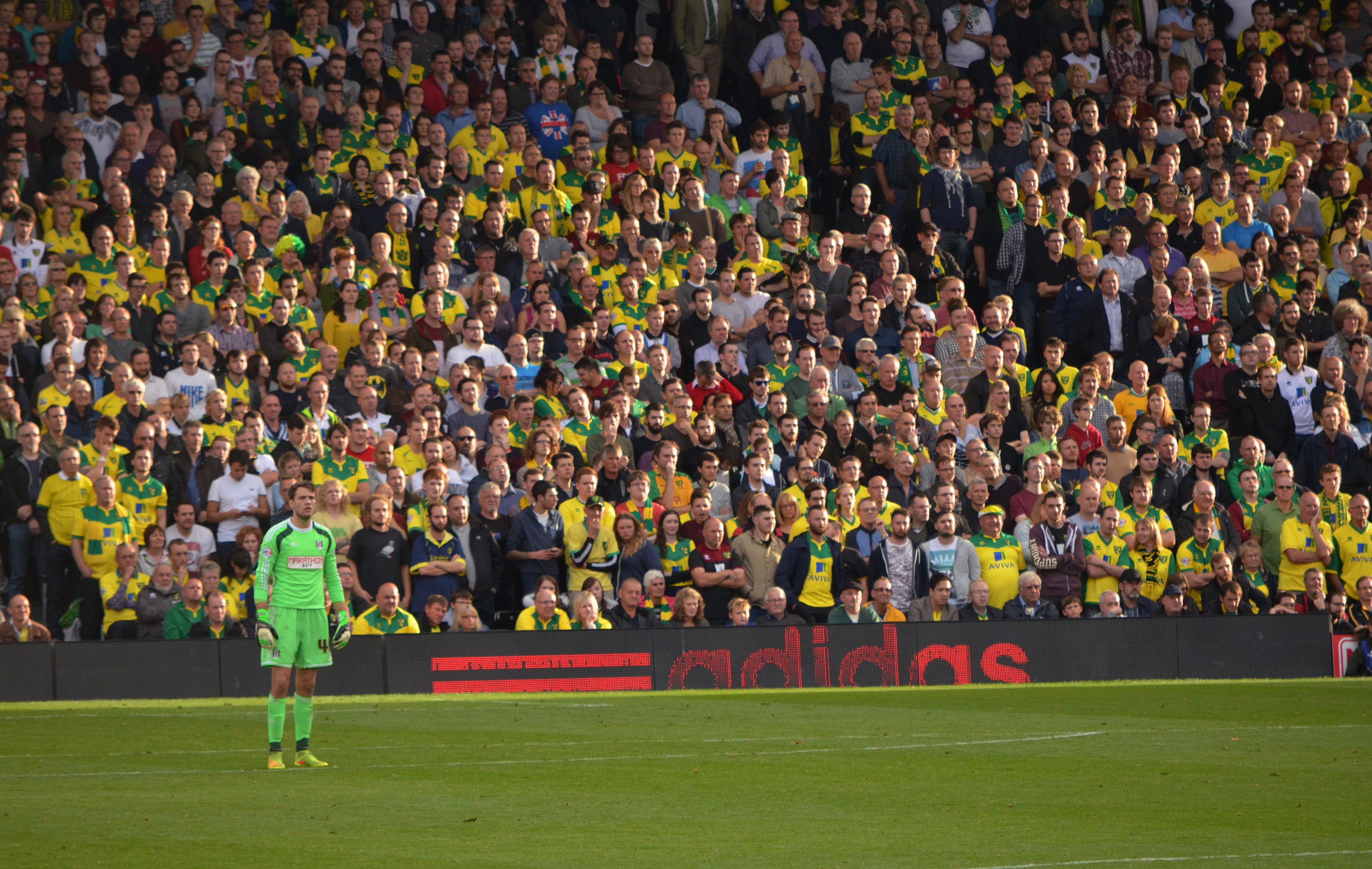 Norwich v Fulham FC (2014)